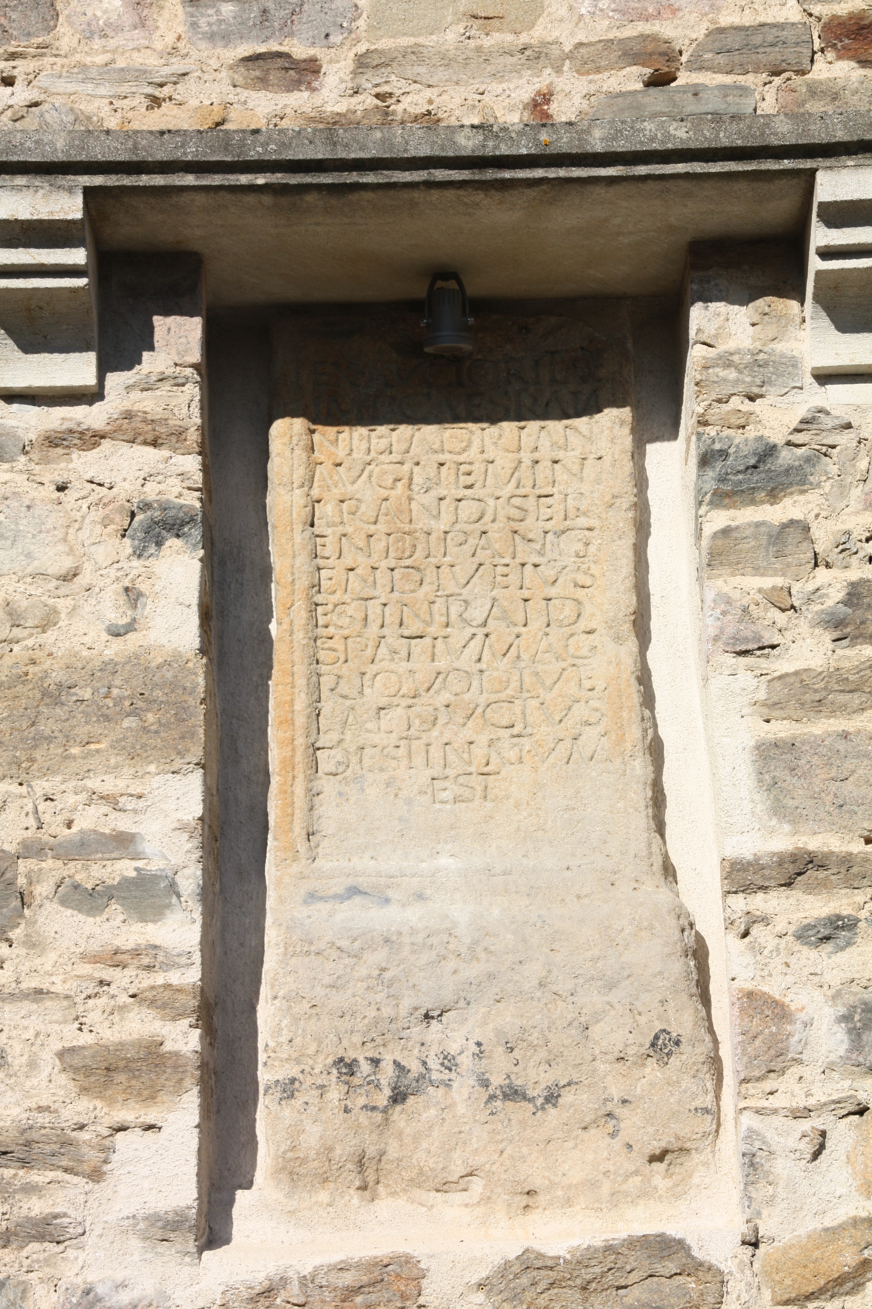 Pierre de Chagnon sur le mur extérieur du clocher - Chagnon.